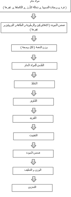 الشكل1